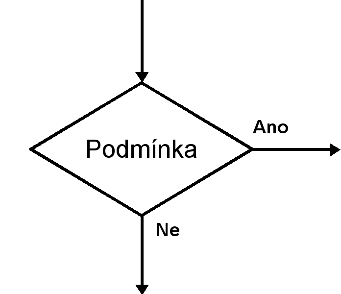 Vývojový diagram podmíněného větvění.